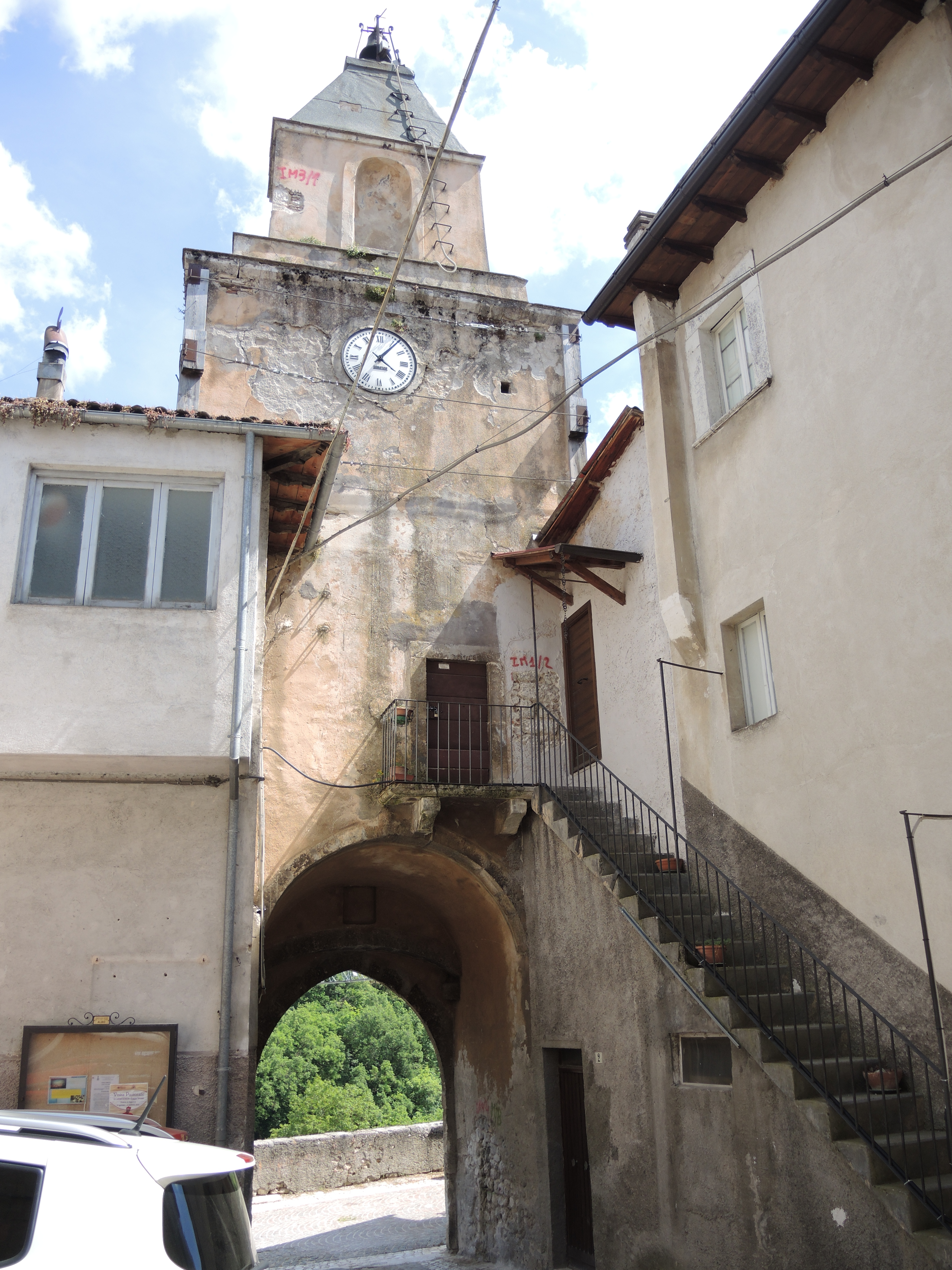 Assergi